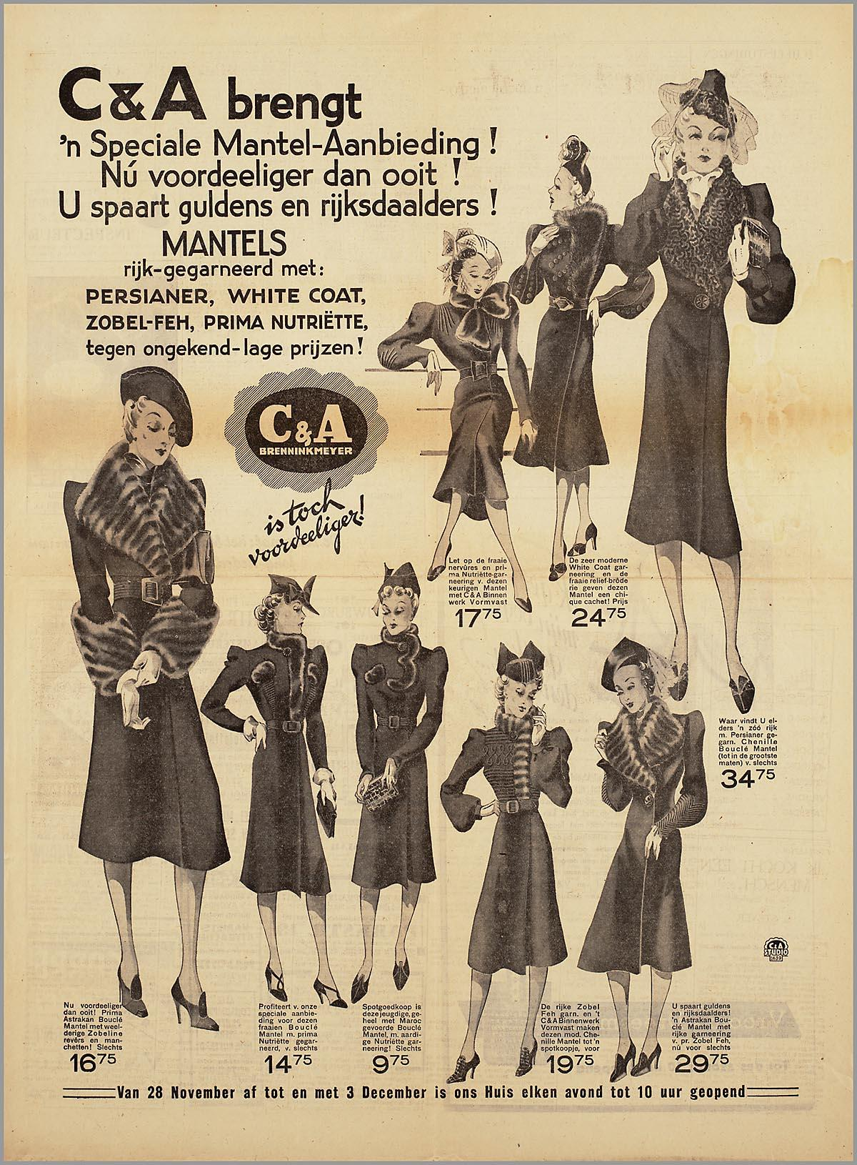 Advertentie in De Telegraaf: C & A brengt 'n Speciale Mantel-Aanbieding! Nú voordeeliger dan ooit! U spaart guldens en rijksdaalders!